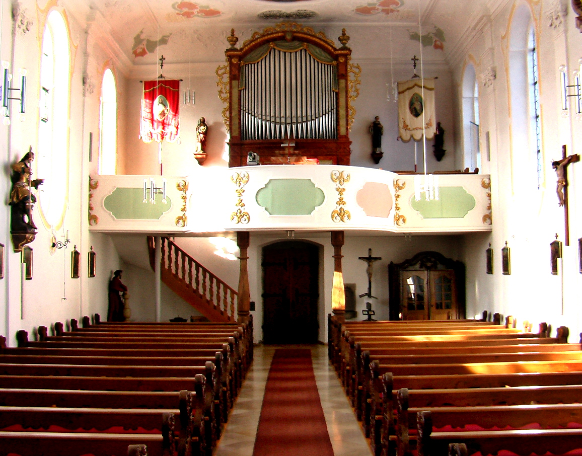 St. Georg Auernheim - Blick vom Hochaltar in Richtung Orgel